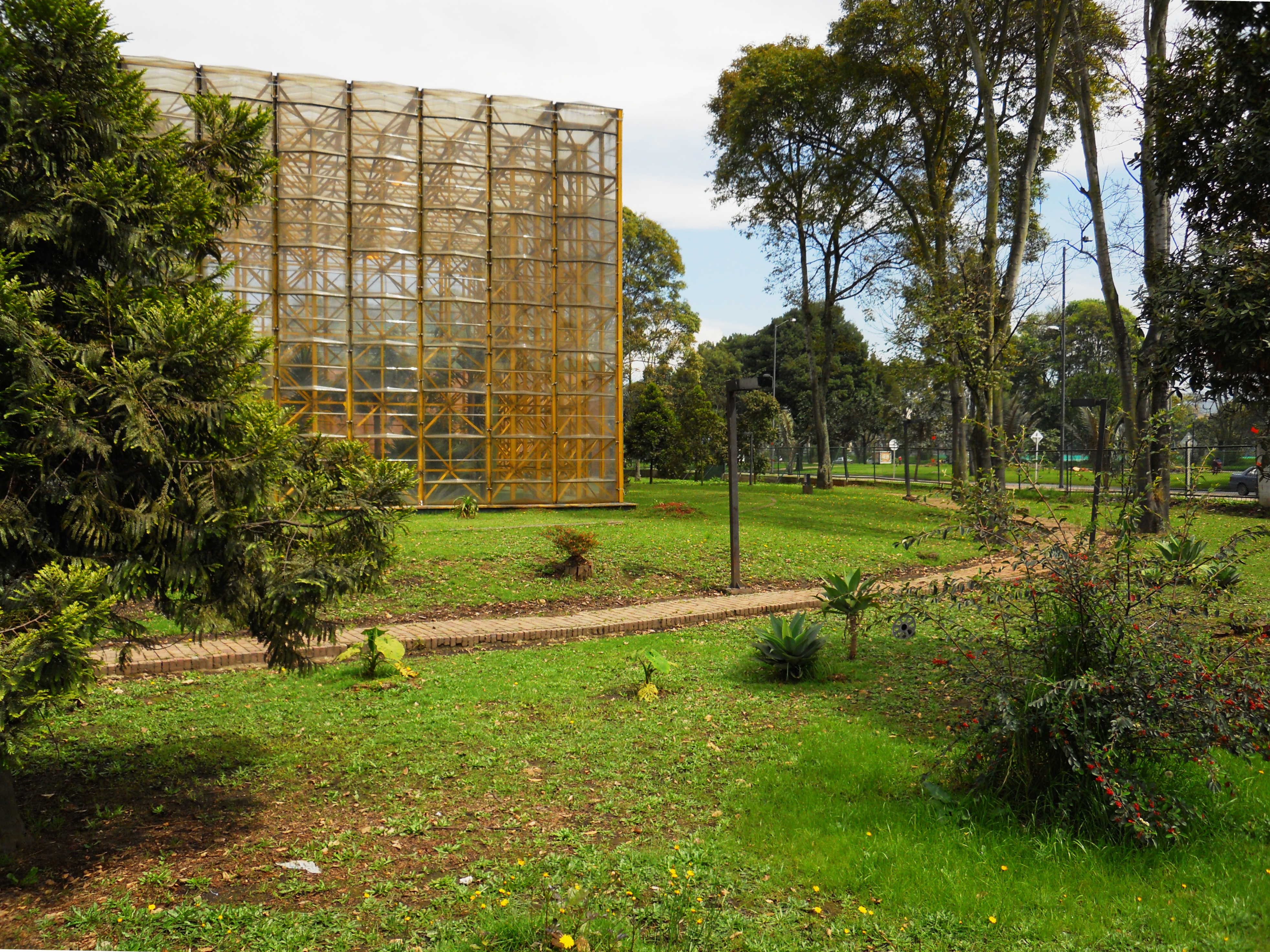 Jardín del Museo de Los Niños, Bogotá.